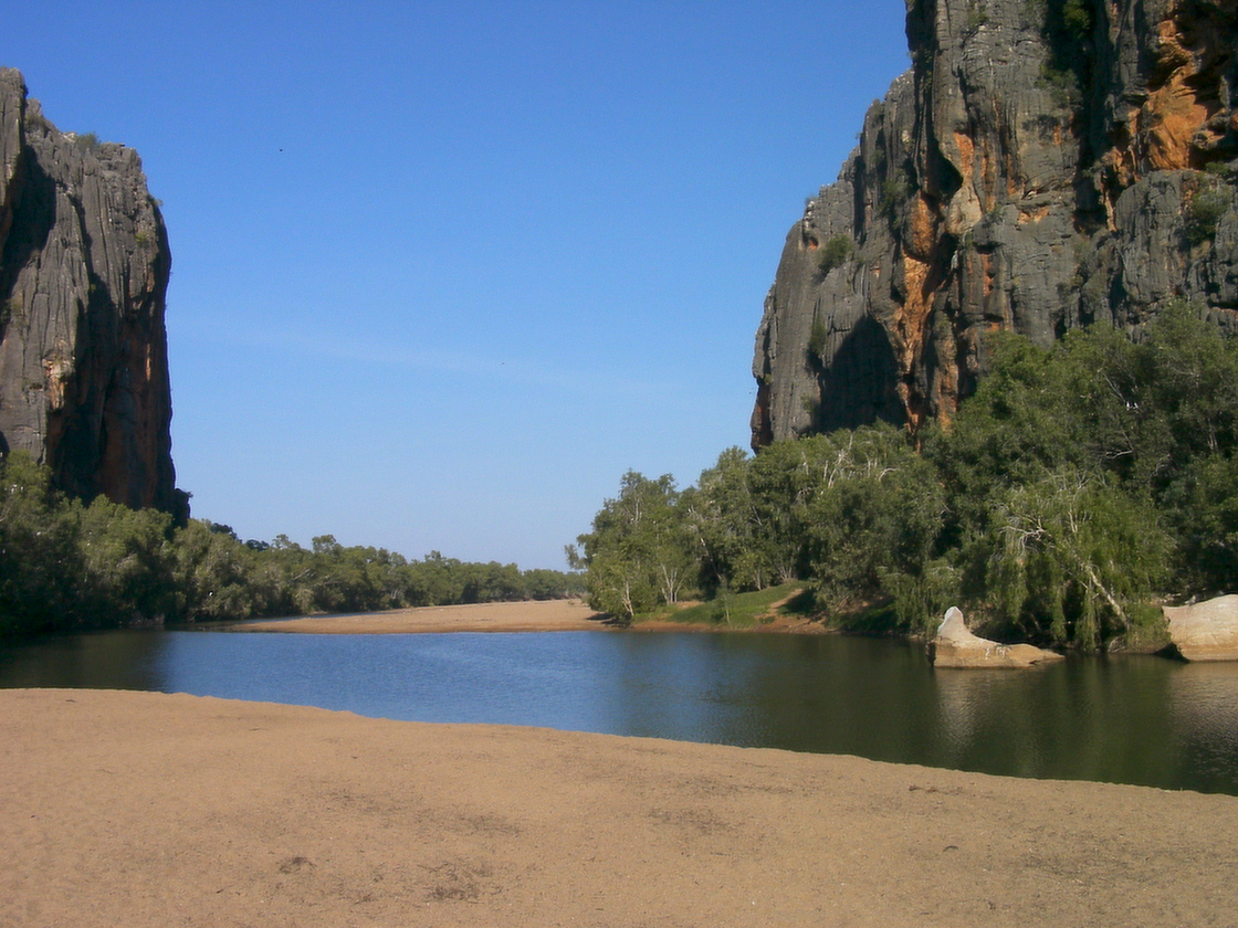 Windjana Gorge (Westaustralien), Blick aus der Schlucht heraus